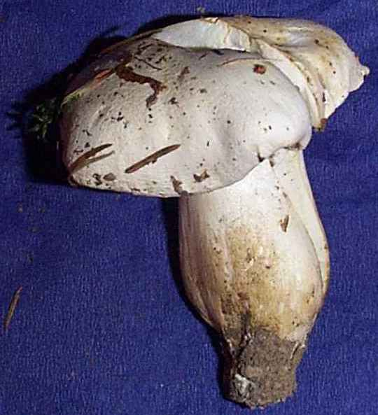 Entolome livide. Photo prise en Savoie. France.